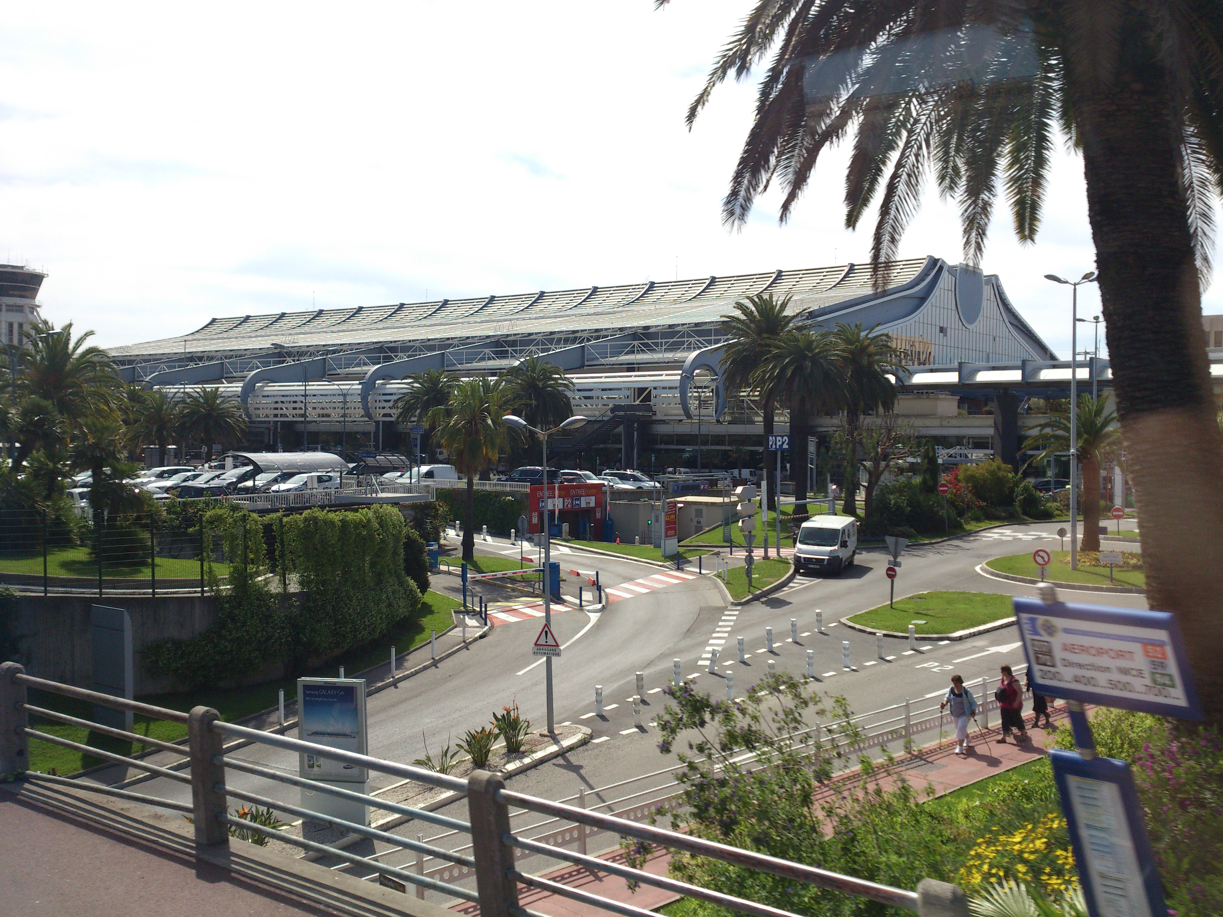 Зграда терминала аеродрома у Ници. Писта се налази у сред мора боје снова, и вероватно је овај аеродром једно од најлепших места за посматрање авиона при полетању и слетању.